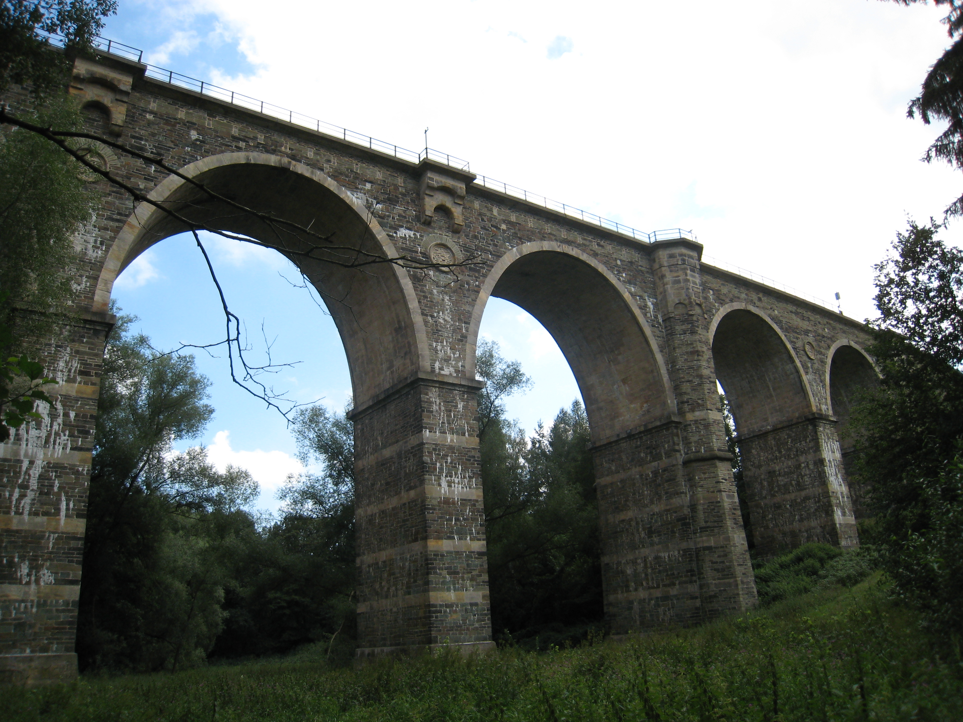 Die Syratalbrücke, eine Eisenbahnbrücke im Syratal in Plauen